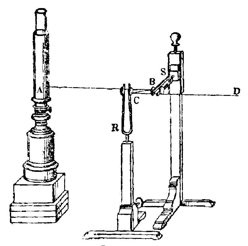 Zestaw z kamertonami i zwierciadełkami do obserwowania krzywych Lissajous: A - lampa R, S - kamertony B, C - zwierciadełka D - promień światła rzutowany na ekran